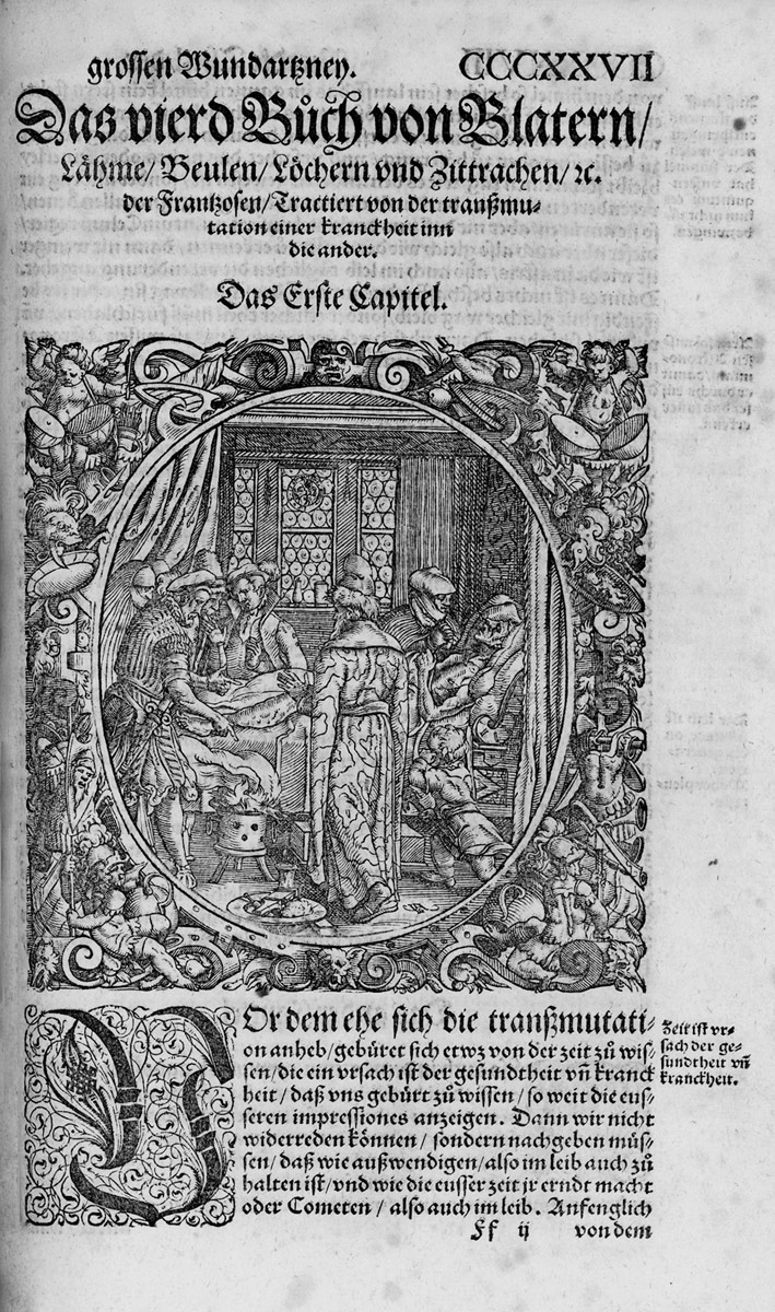 Woodcut from: Theophrast Paracelsus: Opus chyrurgicum. Wund und Artzney Buch … in Truck gegeben Durch Adamum von Bodenstein, Frankfurt, Martin Lechler für Sigmund Feyerabend und Simon Hüter, 15(65).